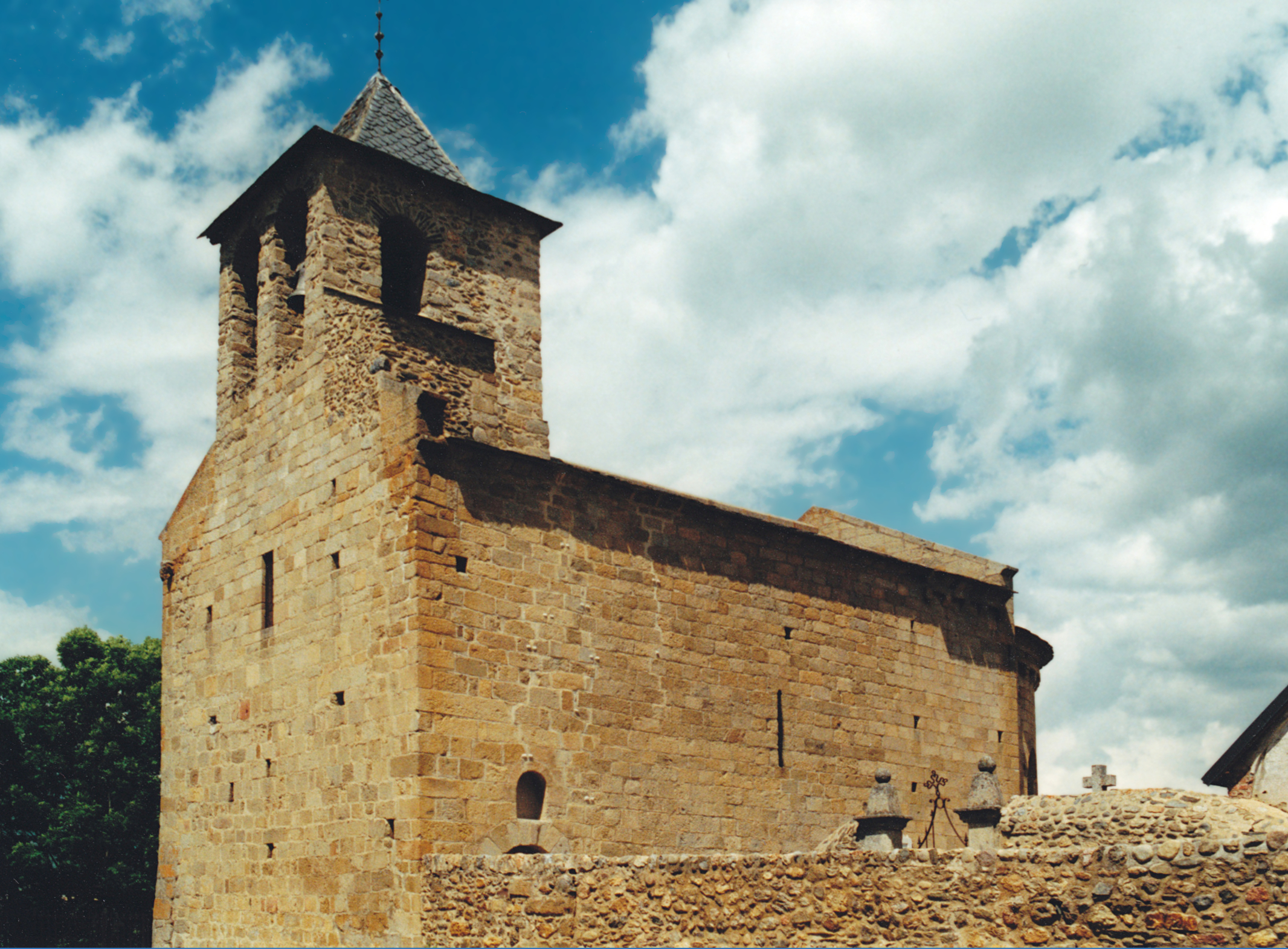 France - Cerdagne - Église Saint-Martin d'Hix